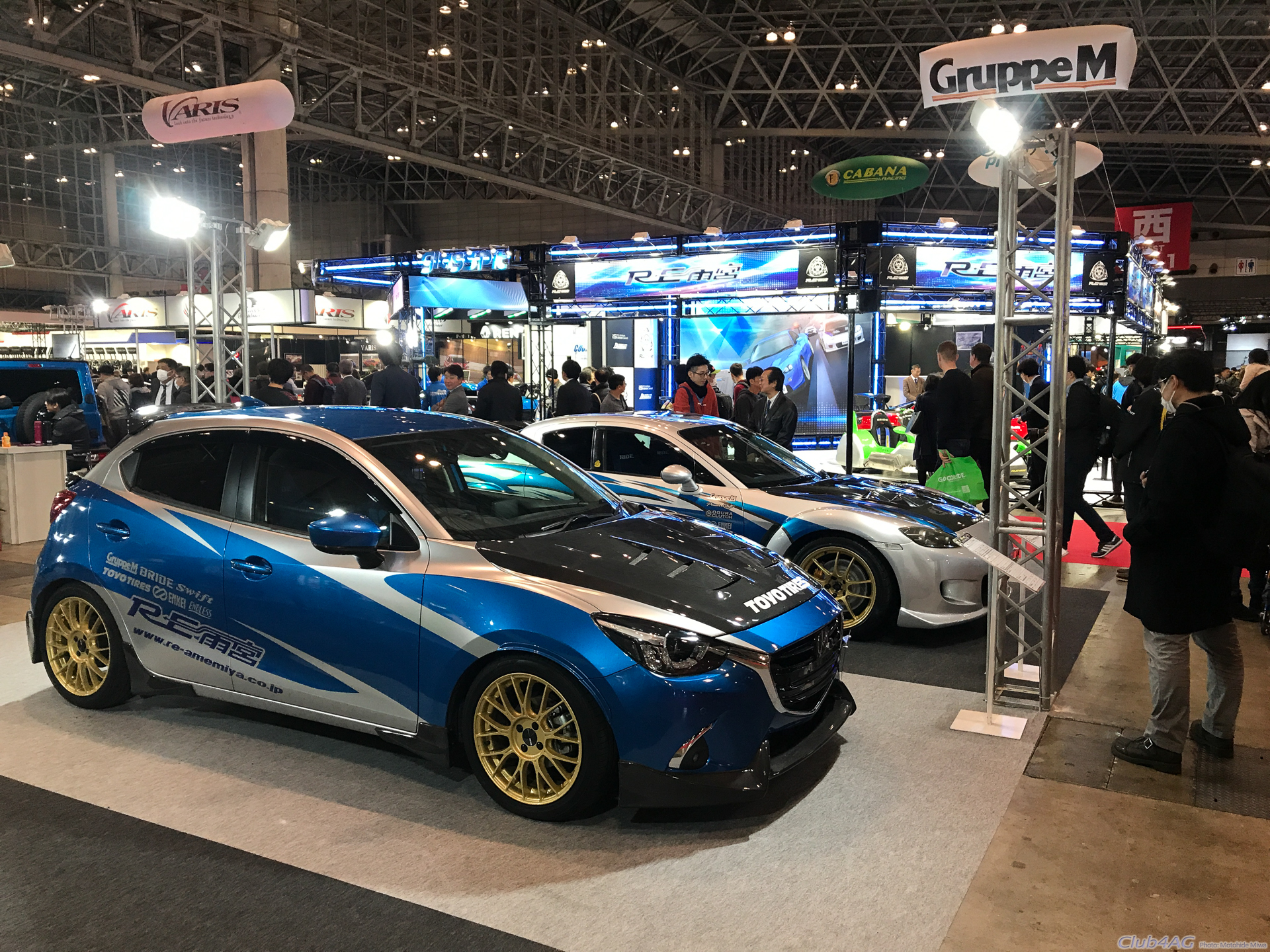 Tokyo Auto Salon 2019